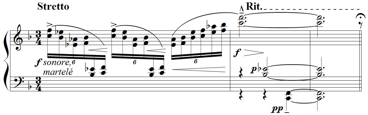 Claude Debussy - Etude "pour les quartes", mes 7-9